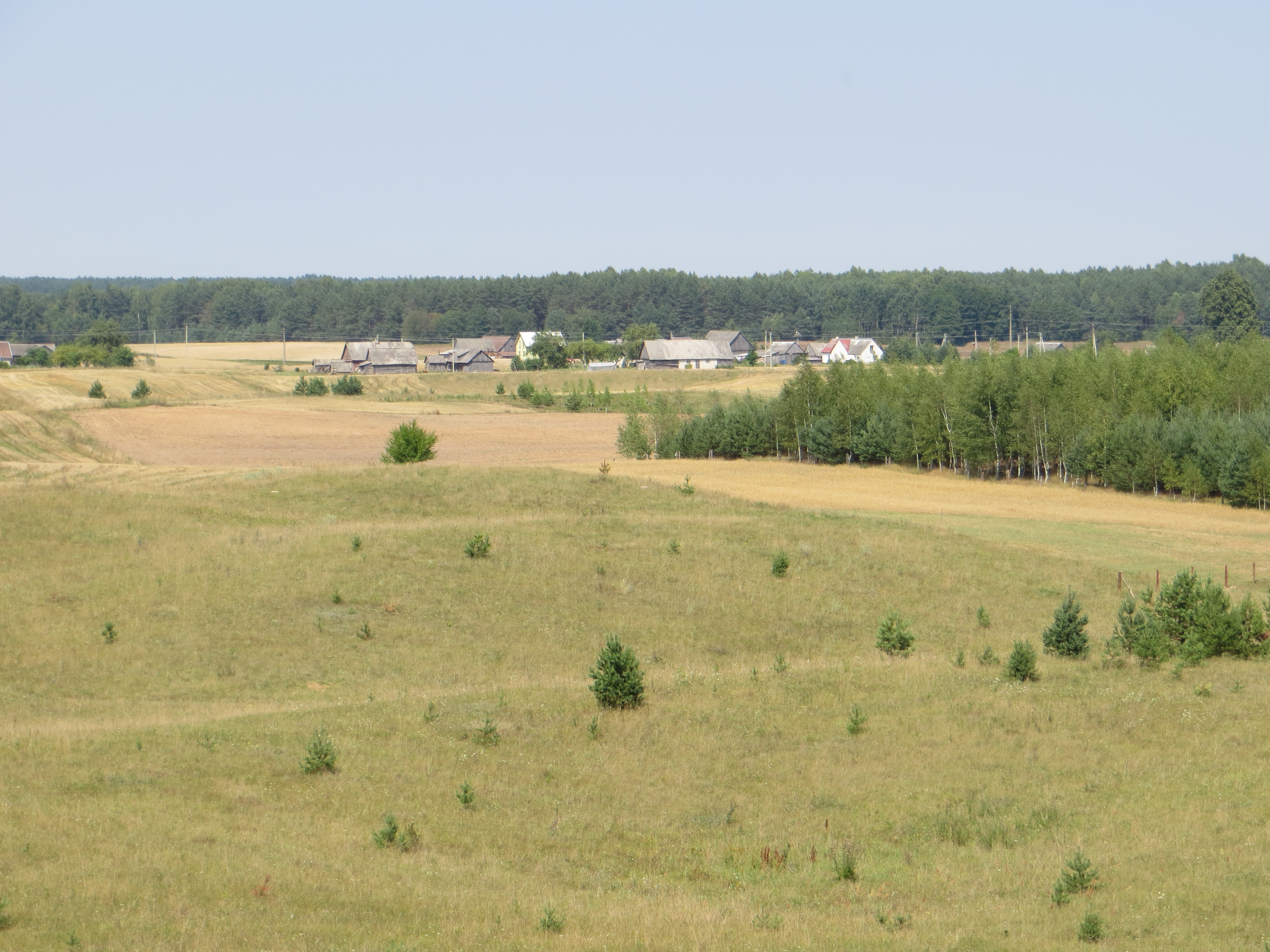 Veisiejų sen., Lithuania